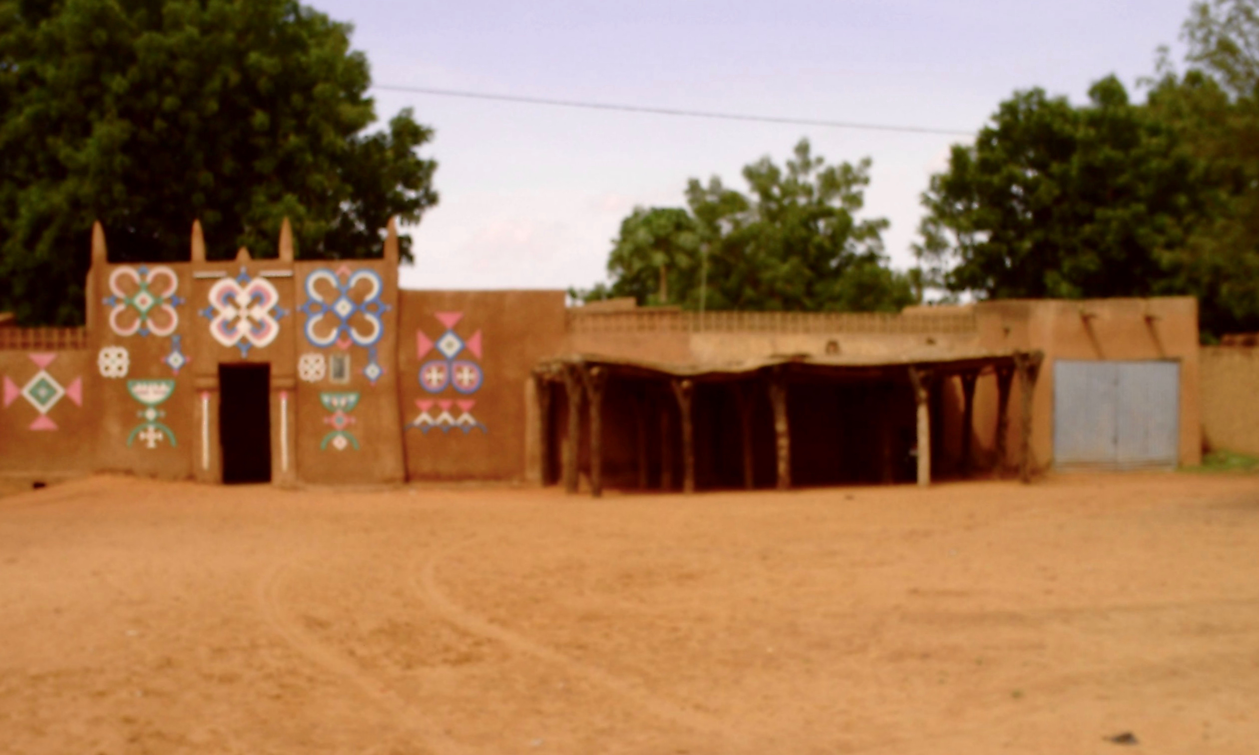 Palais du chef de canton de Gouna